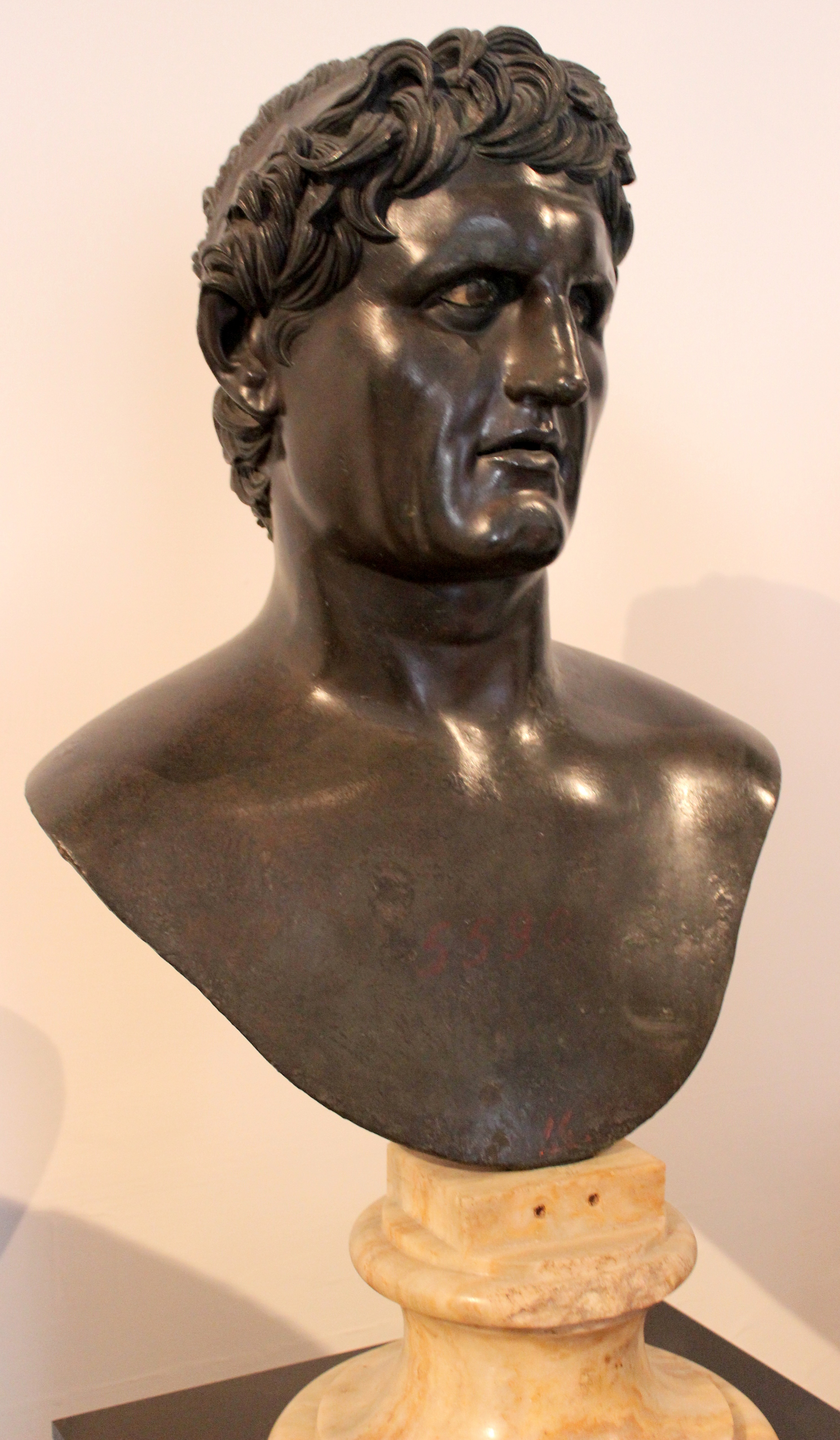 Nápoles. Museo Archeologico Nazionale (inv. 5590). Estatua procedente de la Villa dei papiri en Herculano.